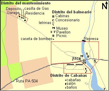 mapa de los edificios del Parque Black Moshannon